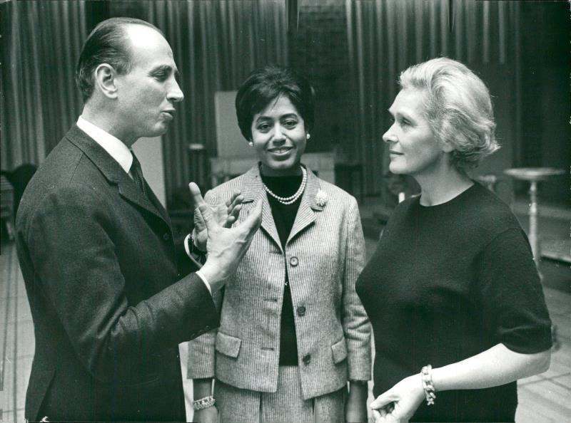 Foto infört i Svenska Dagbladet 1966-11-01 sid 12. Bildtext 1966: "Elisabeth Schwarzkopf kom till pressmottagningen direkt från en första repetition. Här ses hon tillsammans med operachefen Göran Gentele och Mattiwilda Dobbs."